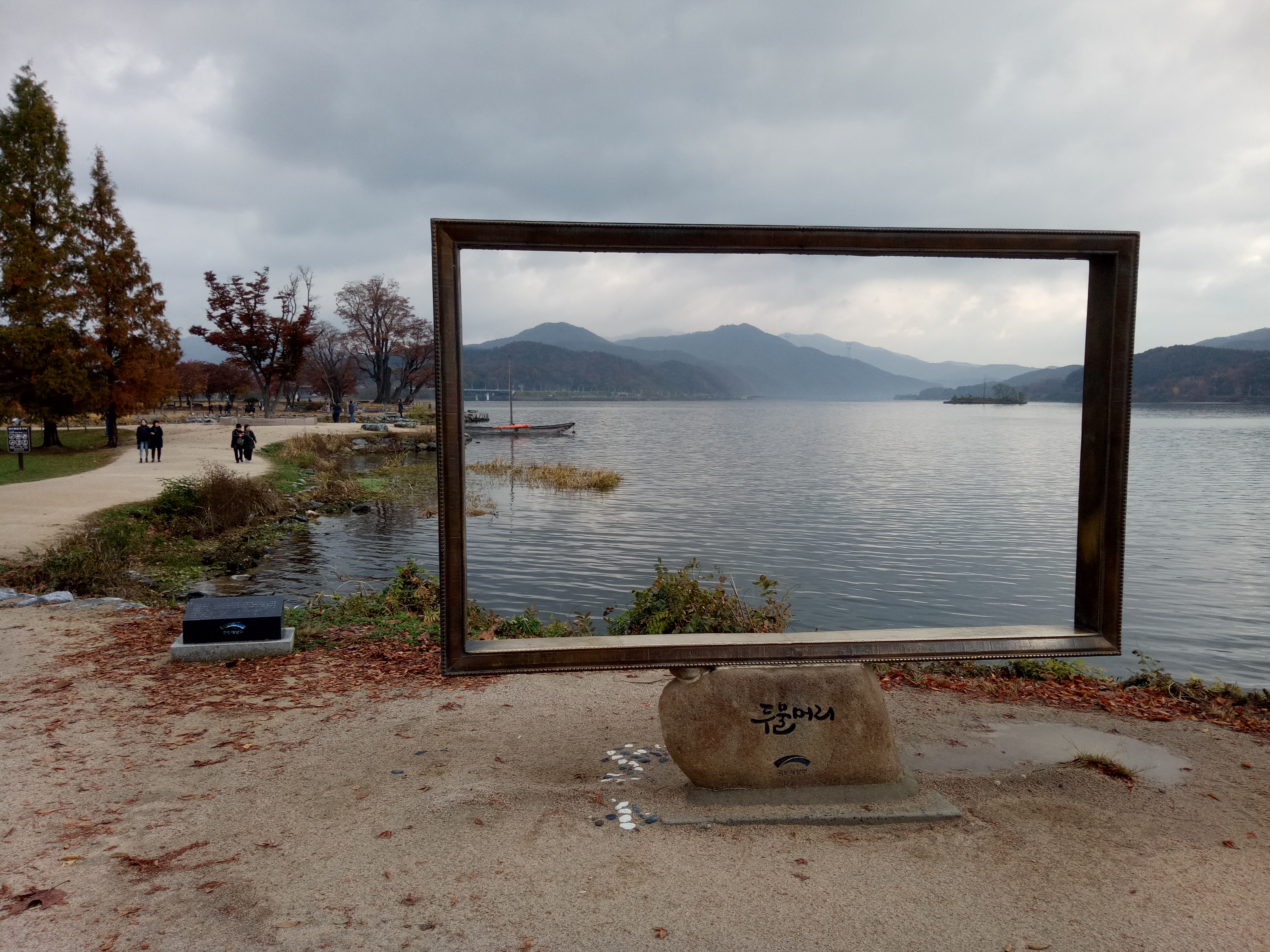 양평 두물머리